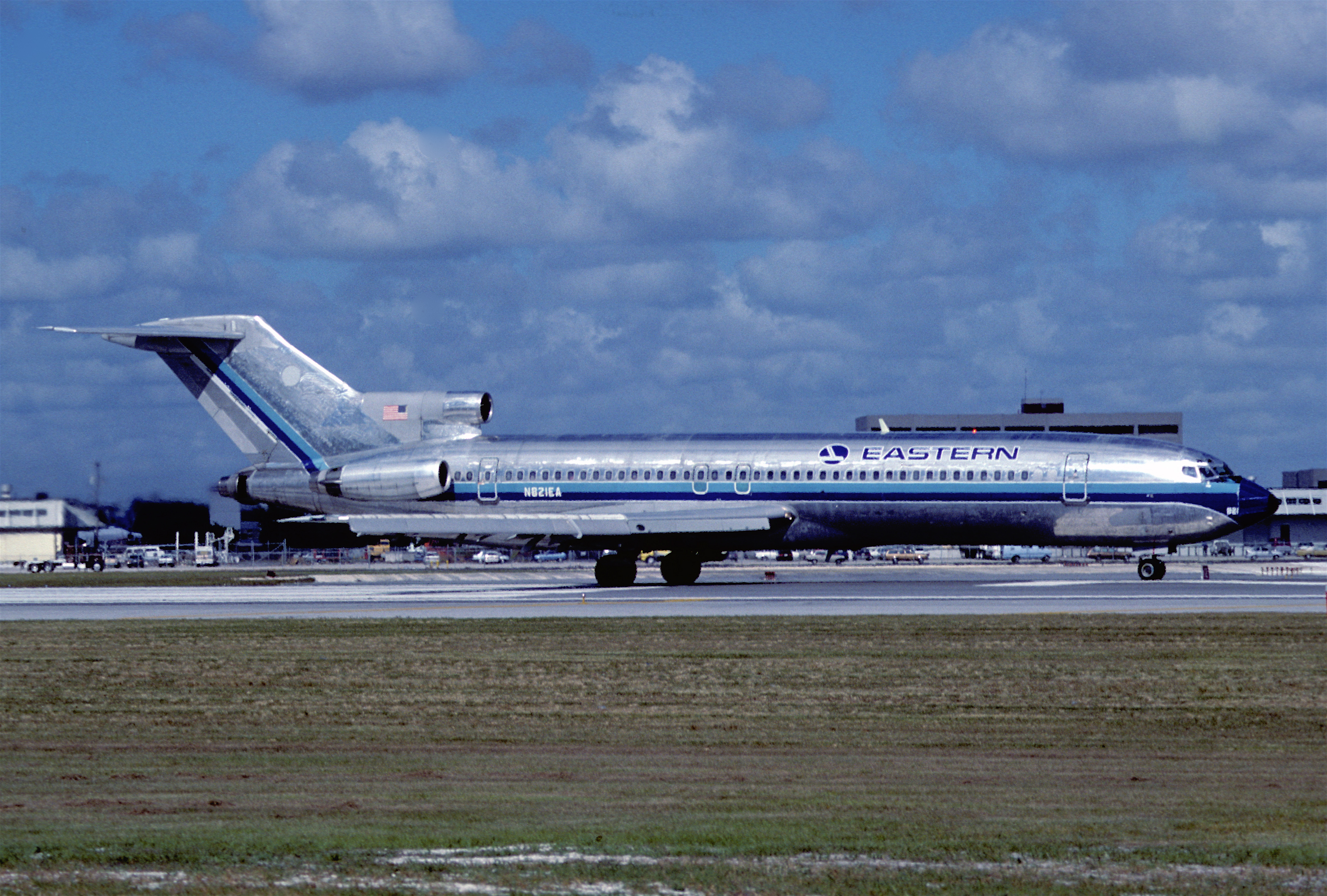 Eastern Airlines Boeing 727-225; N821EA, November 1989/ DWQ